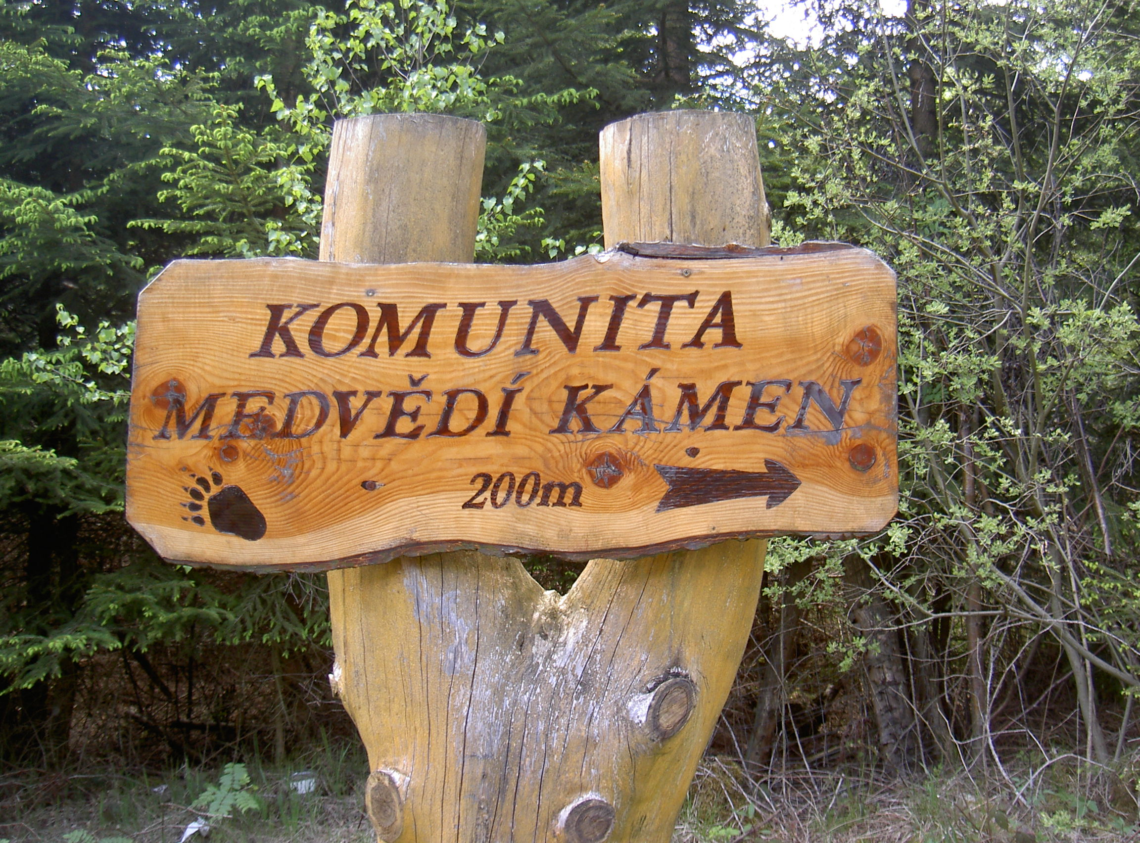 Bernstein (Rybník)